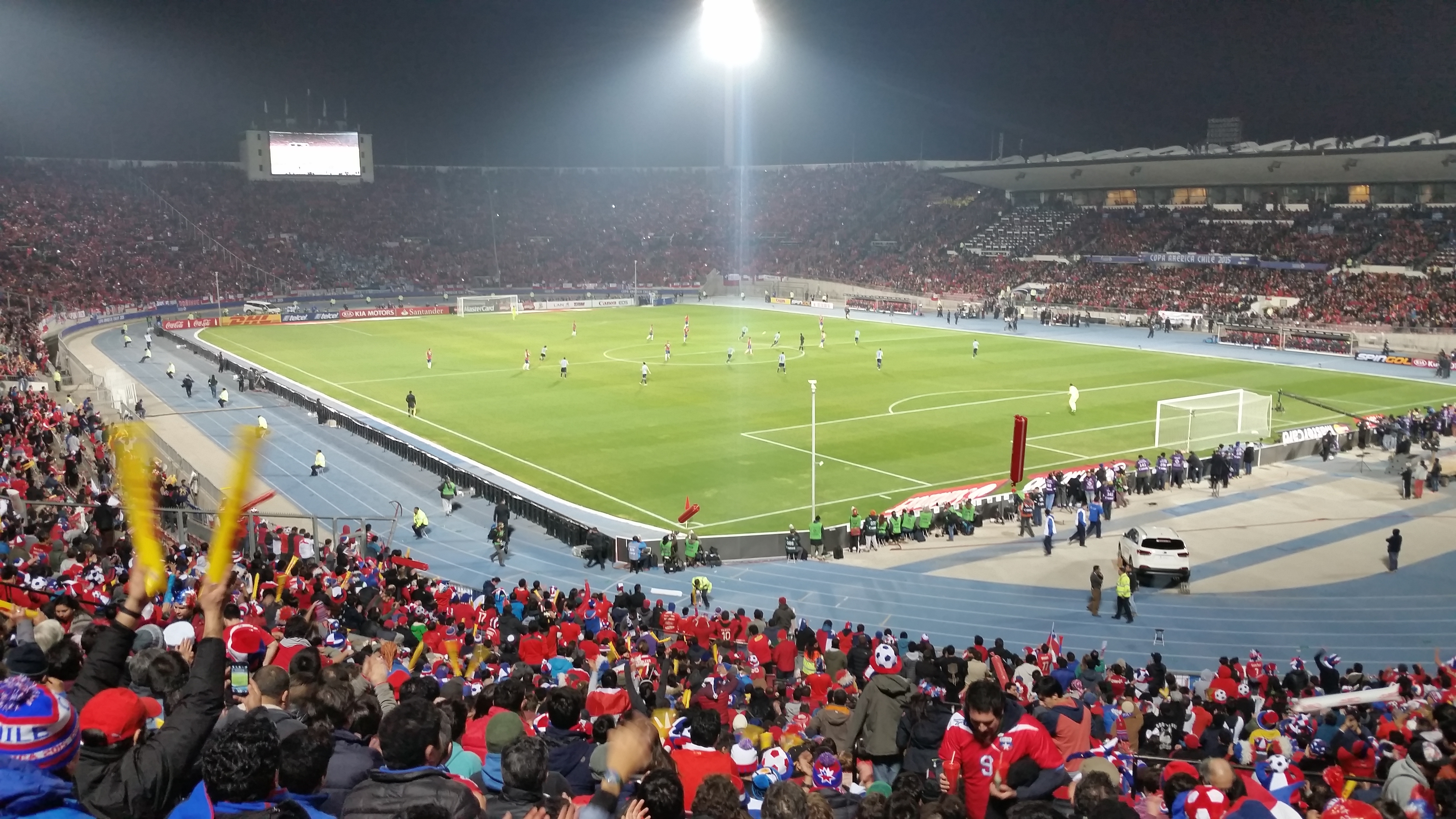 Imagen del partido Chile - Uruguay, valido por los cuartos de final de la Copa América Chile 2015, realizado en Estadio Nacional de Santiago de Chile.